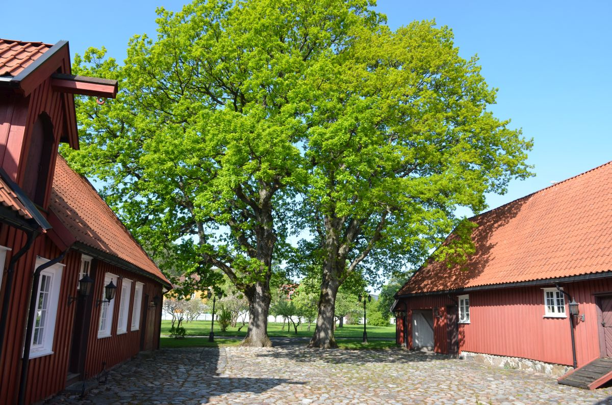 Eiketrærne er en del av hageanlegget til kommandantboligen.